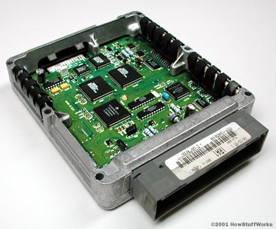 Mootori juhtaju